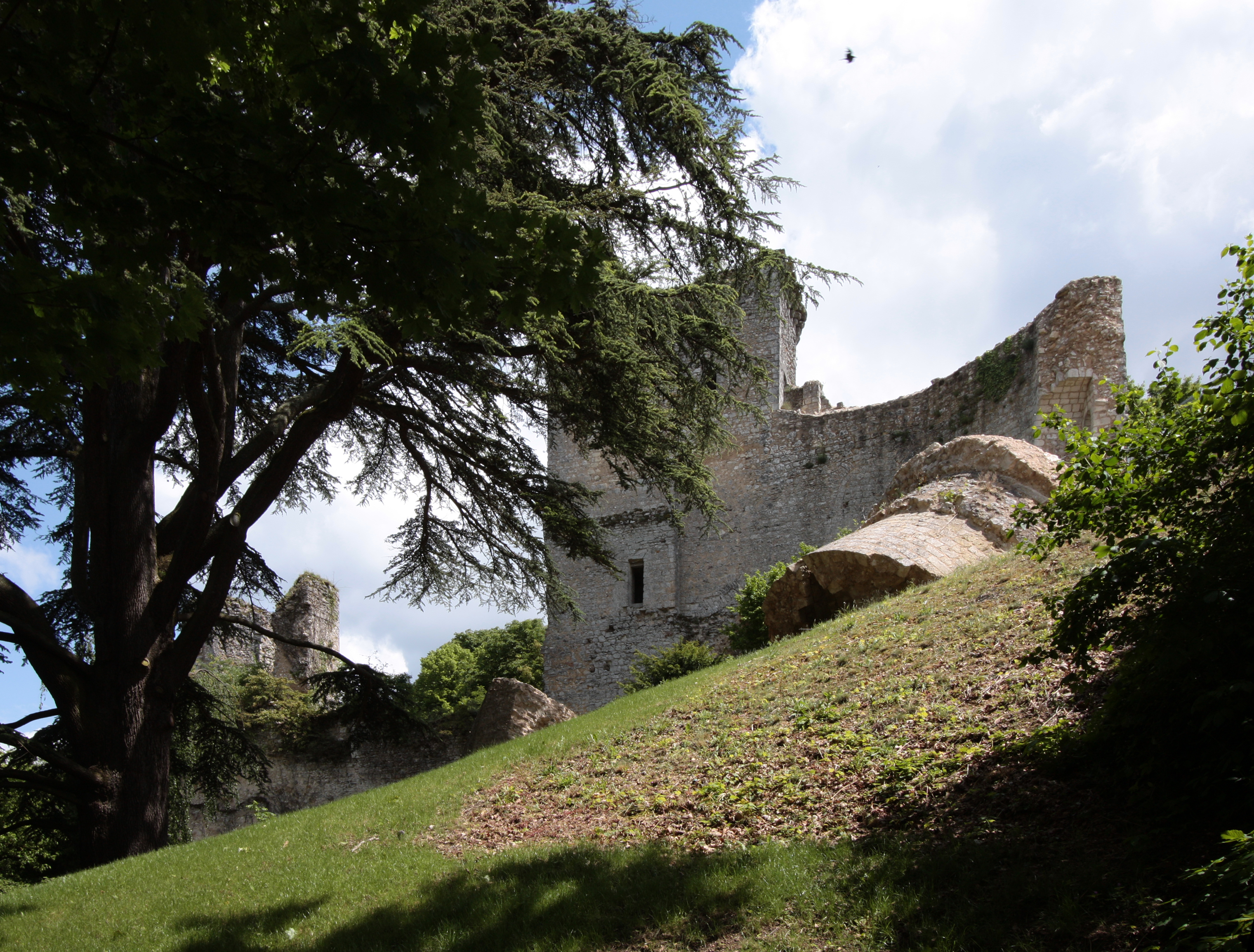 Burg Vendôme in der Kleinstadt Vendôme im Département Loir-et-Cher/Frankreich - Teile der Burgruine Vendôme